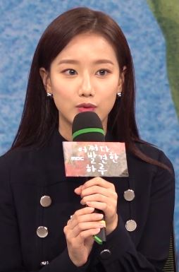 MBC 새 수목드라마 '어쩌다 발견한 하루'는 상큼한 비주얼과 다정한 성격, 겉으로 보기에는 모자랄 것 없이 풍족해 보이는 엄친딸 여고생 은단오(김혜윤)가 정해진 운명을 거스르고 사랑을 이뤄내는 본격 학원 로맨스를 다룬 작품입니다.